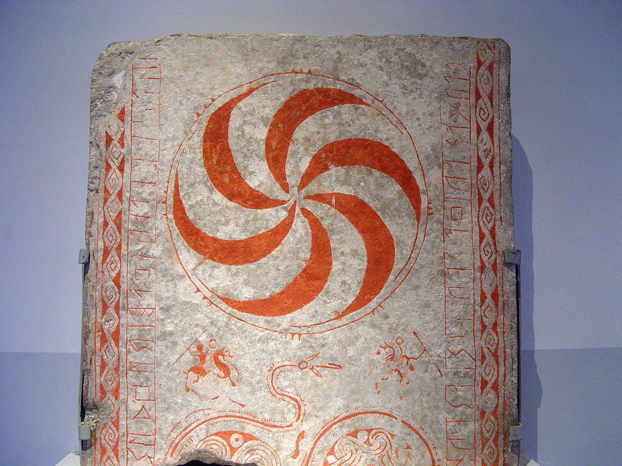 Bildstein (G 264) im Museum Fornsalen, Visby (Gotland).